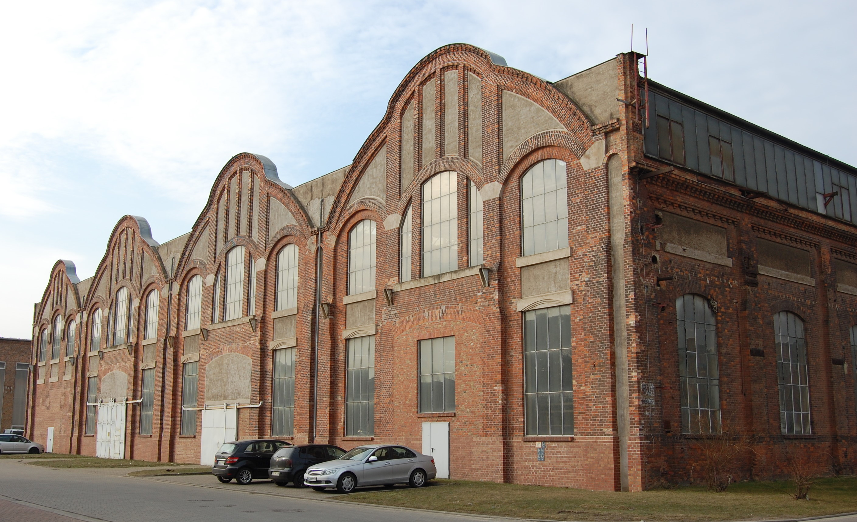 Kesselschmiede auf dem SKL-Gelände in Magdeburg-Salbke